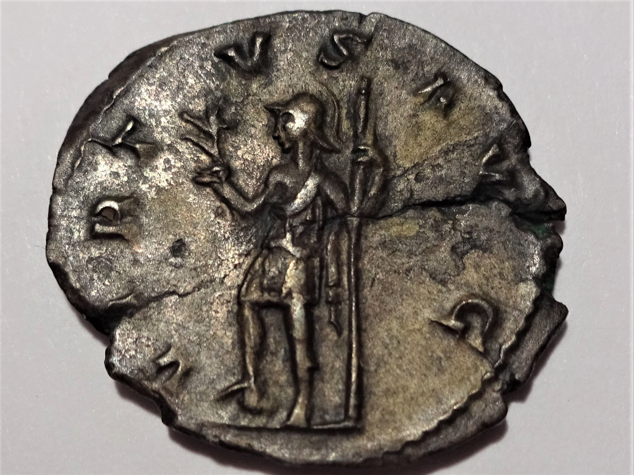 Rückseite eines Antoninian des Aemilianus' (Kampmann 85.16) mit Schrötlingsriss von 3 bis 8 Uhr verlaufend